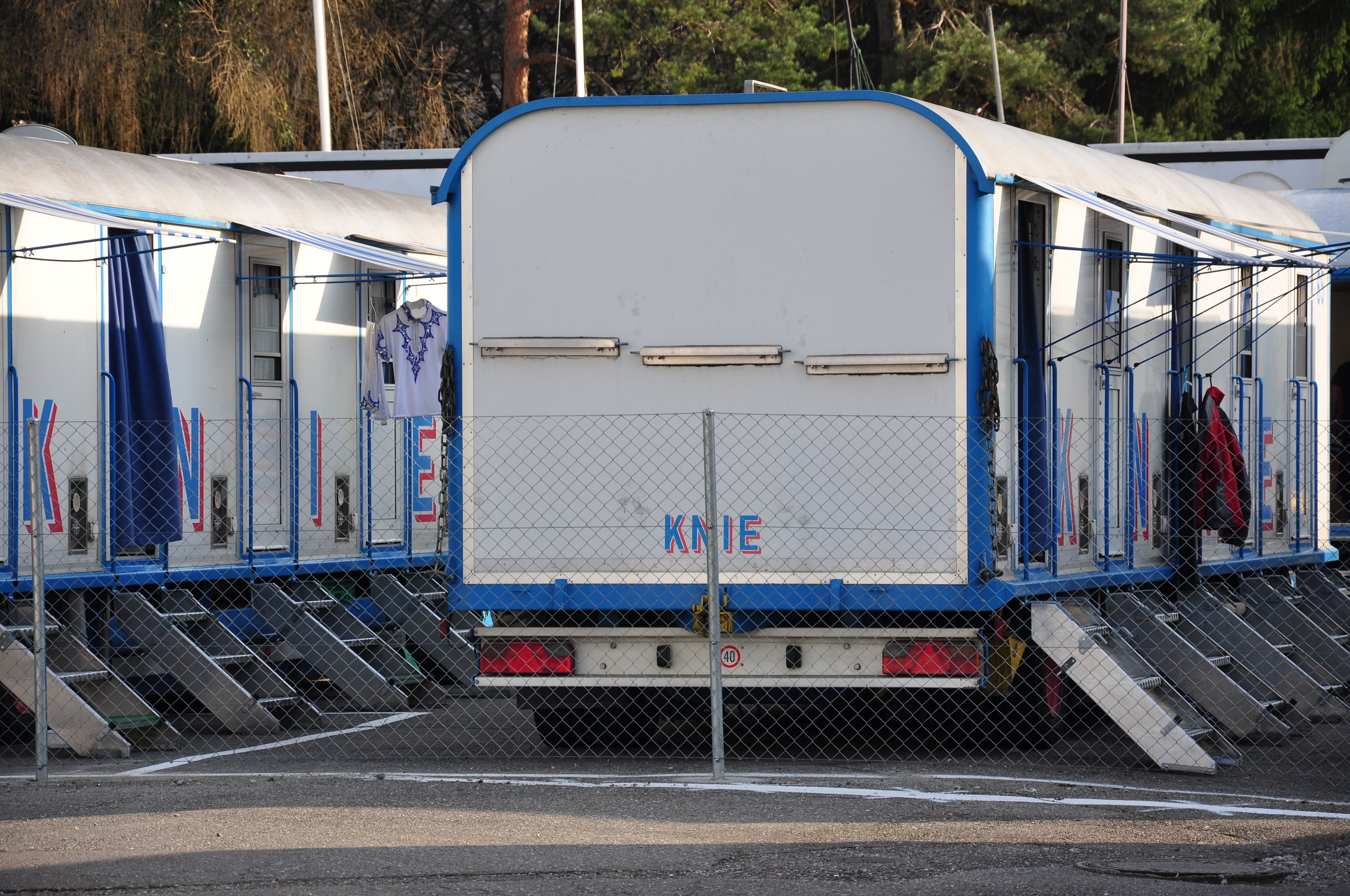 Circus Knie in Rapperswil (Switzerland)